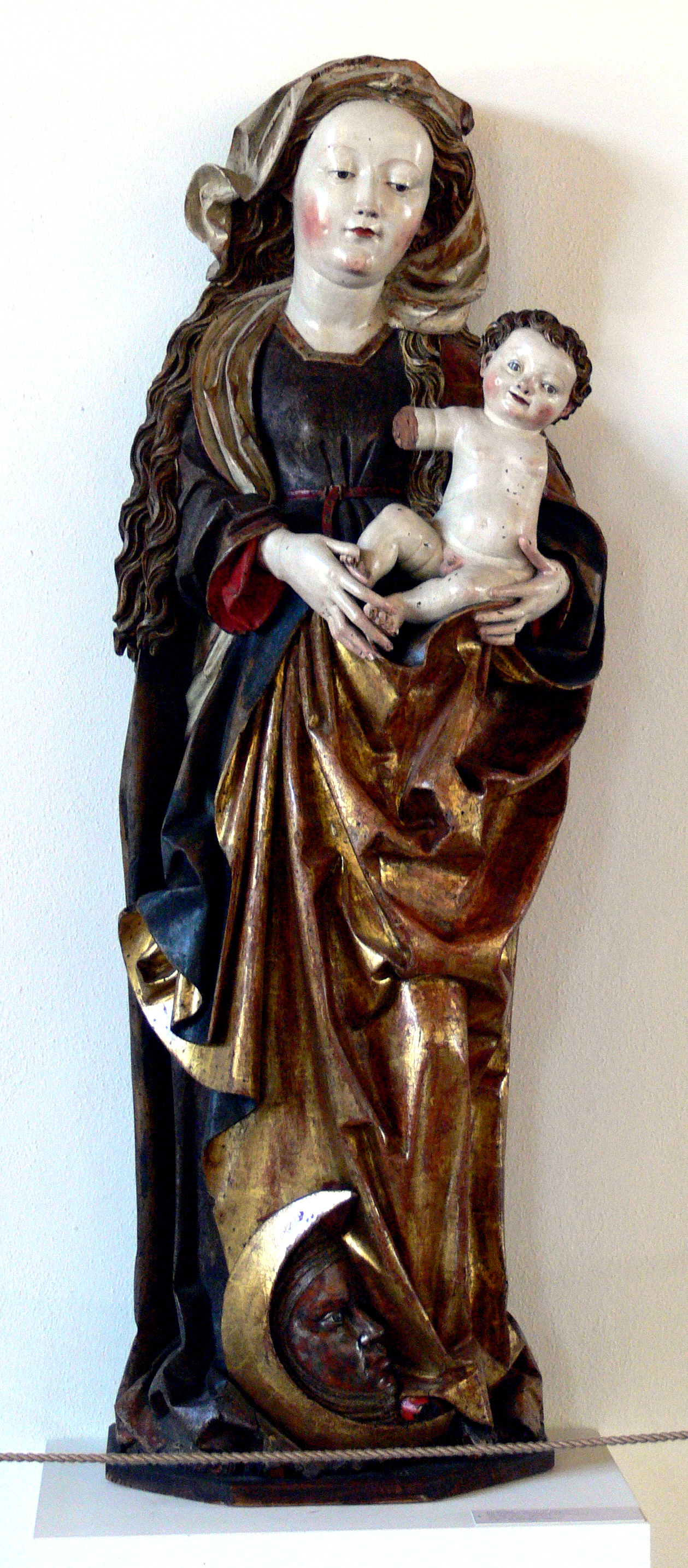 Schaffhausen, Museum zu Allerheiligen Ivo Strigel (oder Werkstatt): Madonna mit Kind, 1505 (Teil des ehem. Hochaltars der Stiftskirche San Vittore, Misox GR), Weichholz, gefasst, Inv. Nr. P 351 (Sturzenegger-Stiftung)